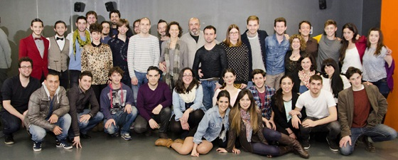 persones de l'equip psdtlc a barcelona